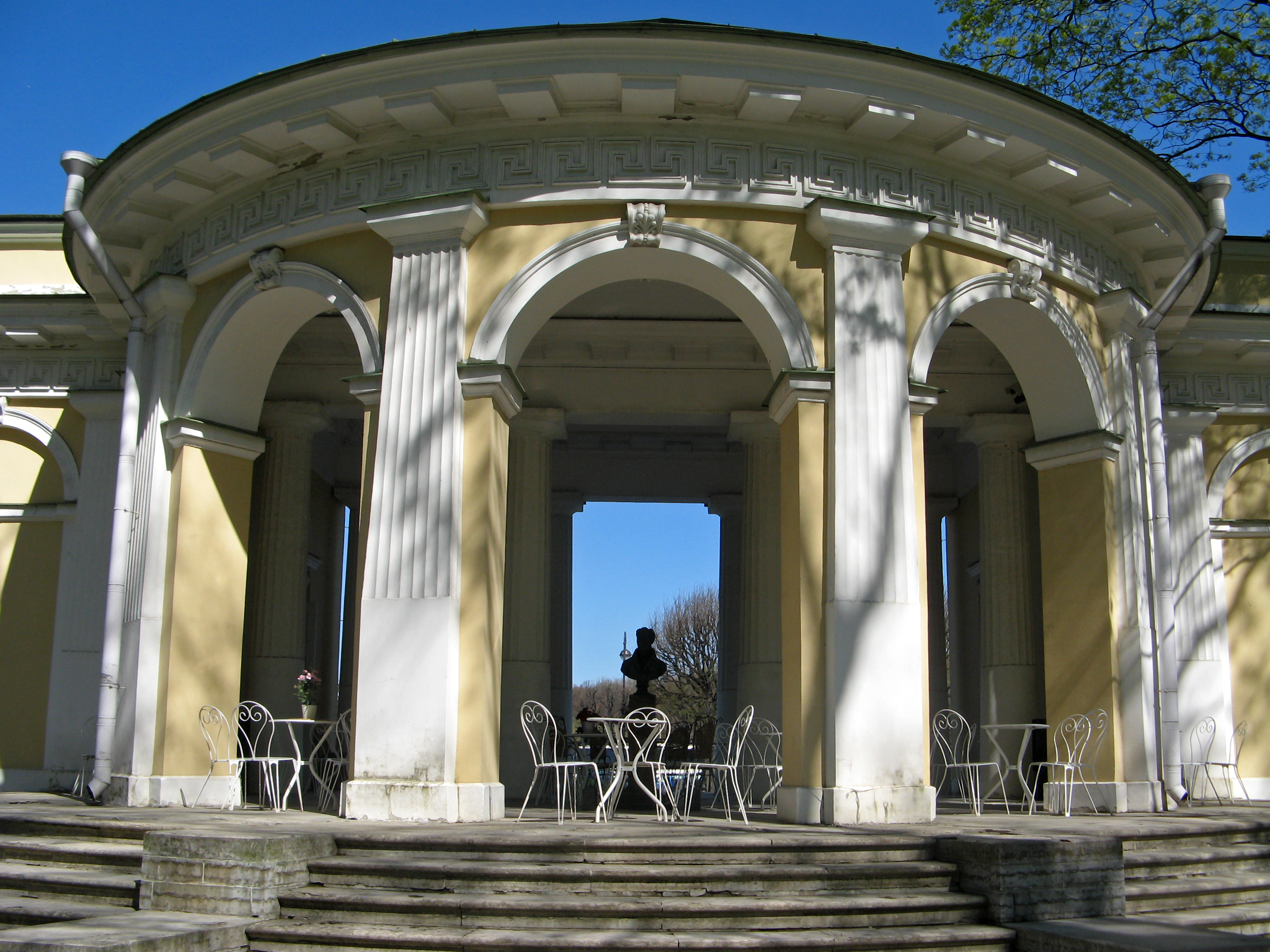 Садовый павильон (павильон Росси): набережная р. Мойки, Михайловский сад, Центральный район, Санкт-Петербург